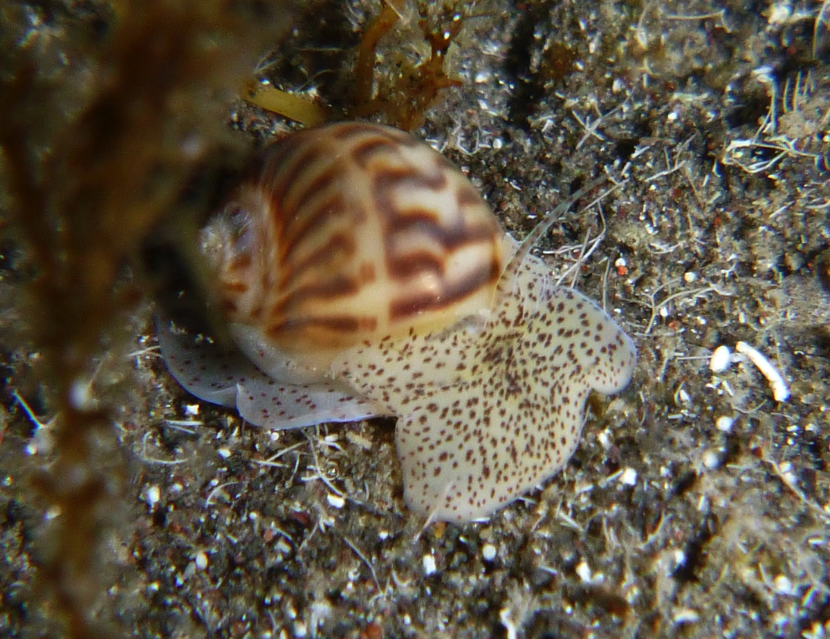 Notocochlis gualteriana à la Réunion